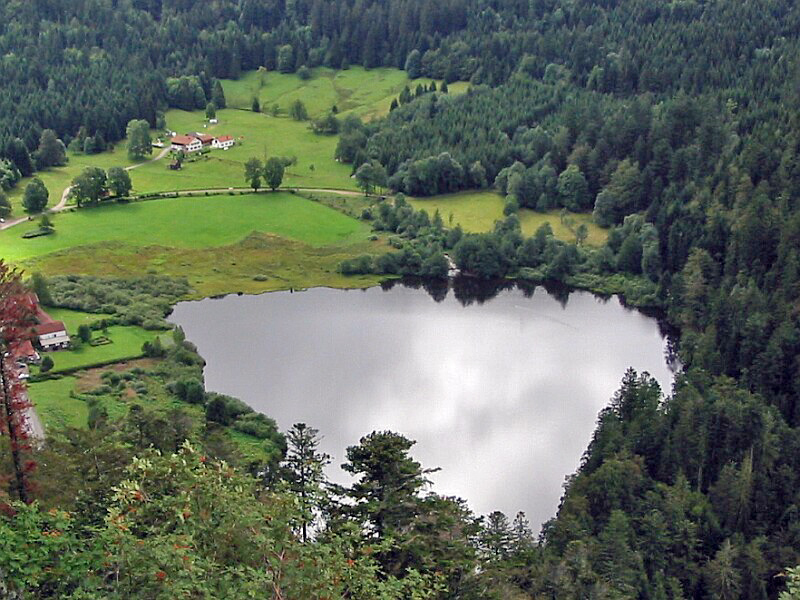 De Séi vu Retournemer